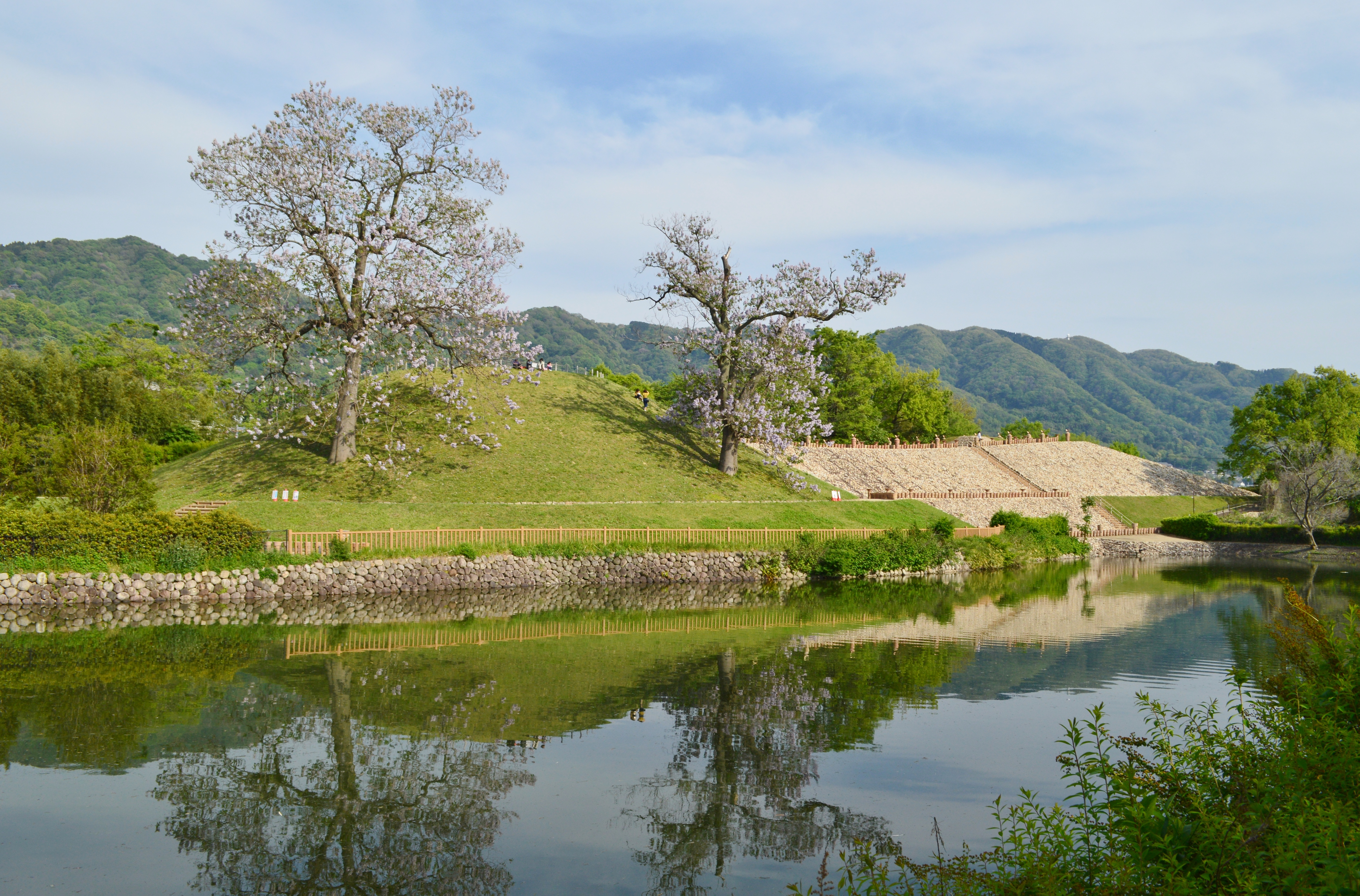 心合寺山古墳 墳丘全景